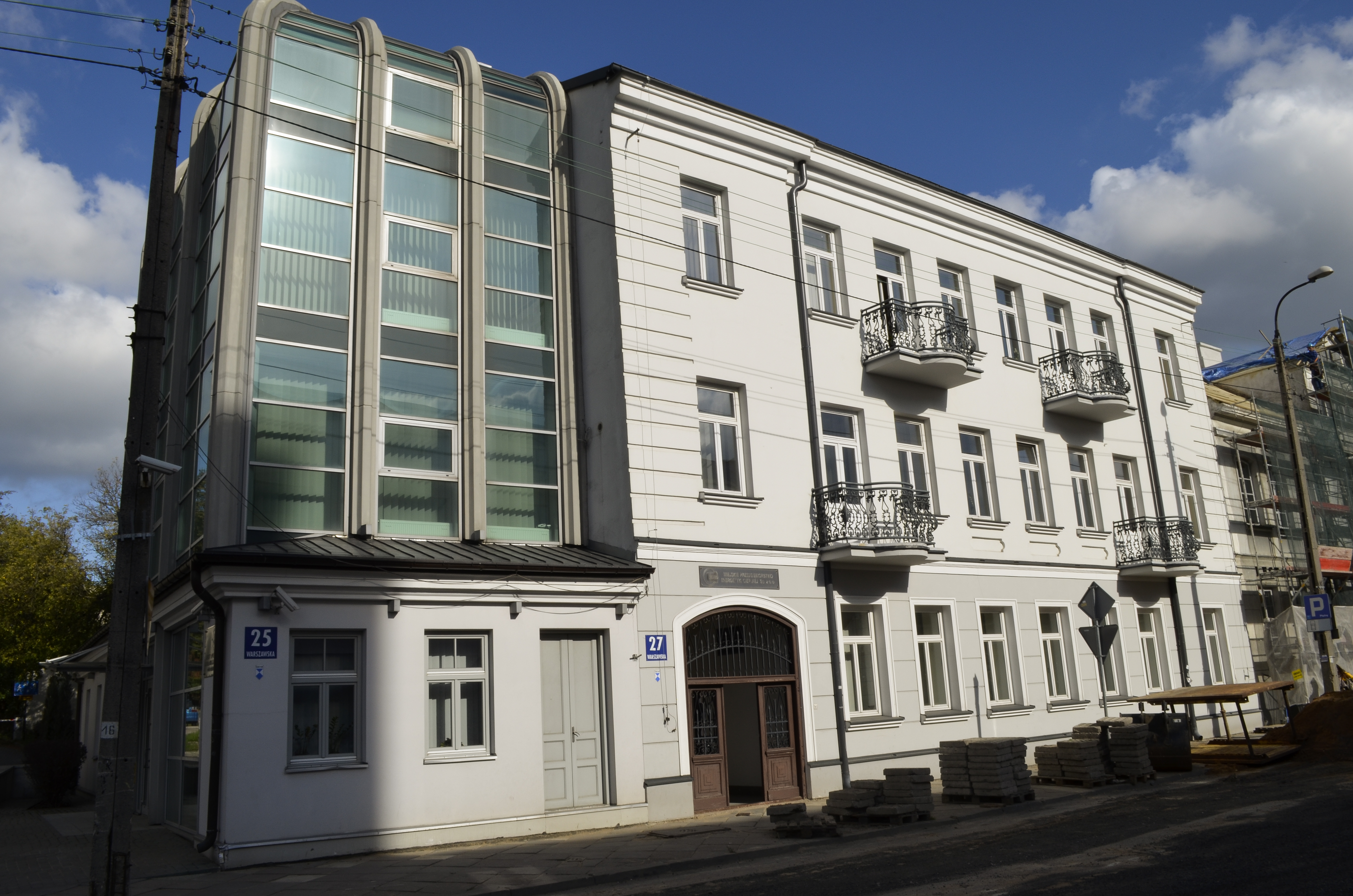 Białystok ul. Warszawska - kamienice, od lewej - ul. Warszawska 25 - budynek z kontrowersyjną dobudówką - ul. Warszawska 27 - budynek zabytek nr A-168 z 3.06.1993